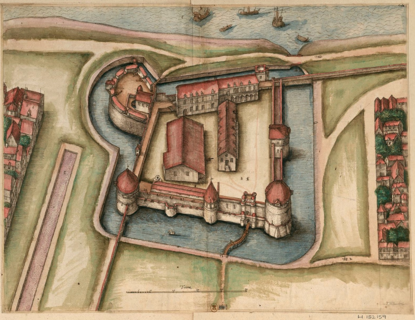 Vieux palais à Rouen, XVIIe siècle (dessin : plume, encre brune et aquarelle).